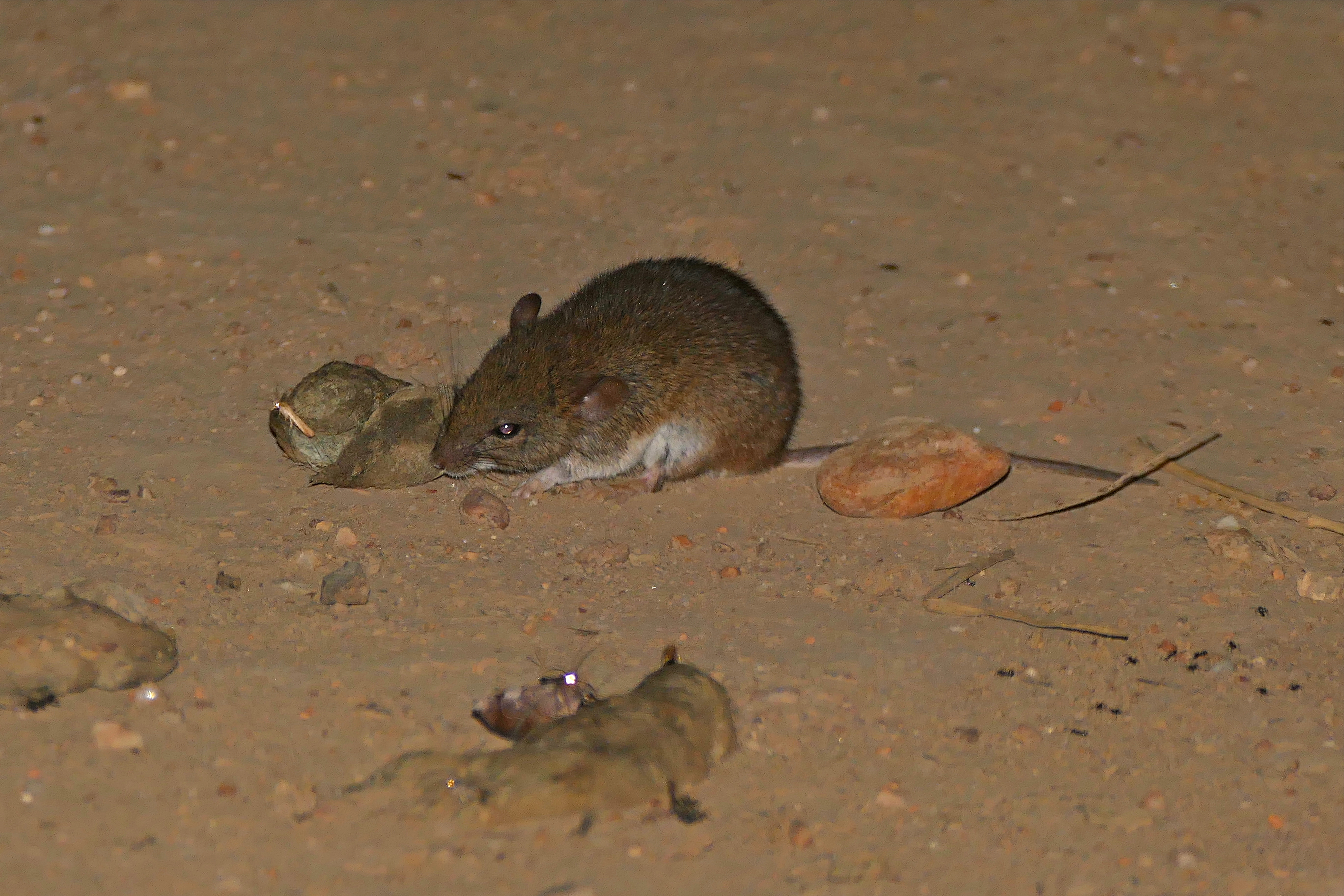 Porto Jofre, Pantanal, Poconé, Mato Grosso, BRAZIL